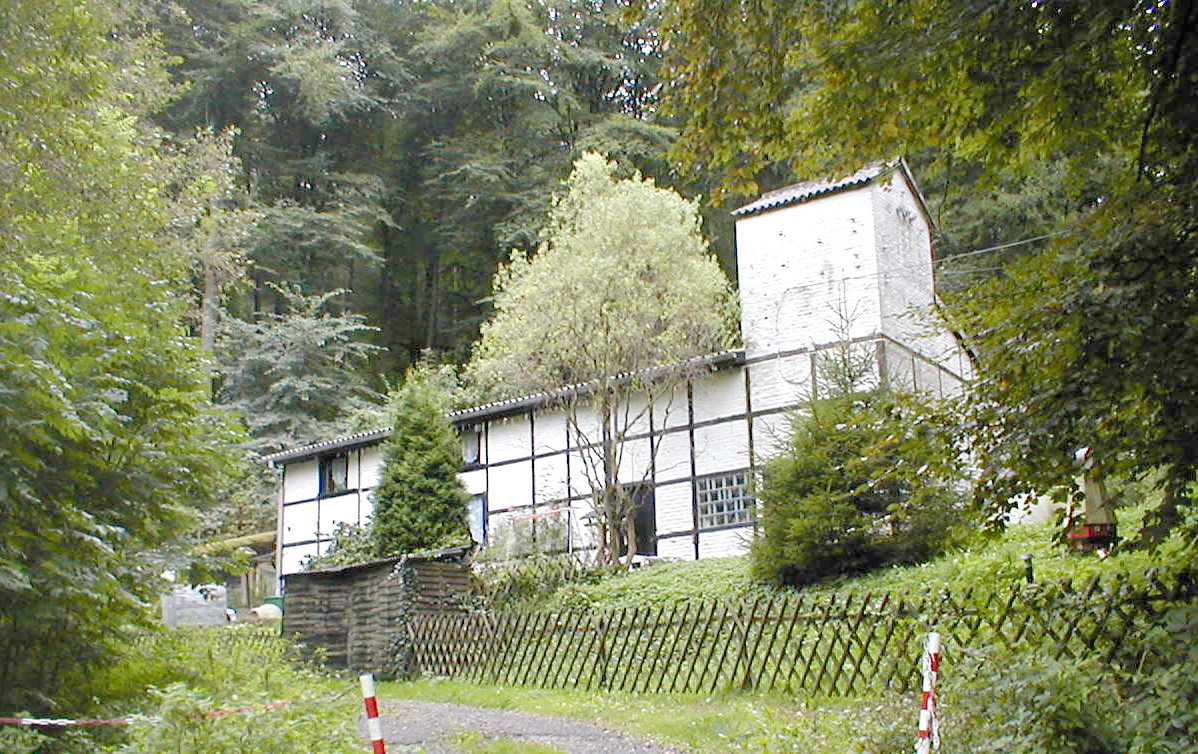 Das ehemalige Kompressorgebäude der stillgelegten Eisenerzgrube Porta am Königsberg in Minden-Häverstädt, Nordrhein-Westfalen.